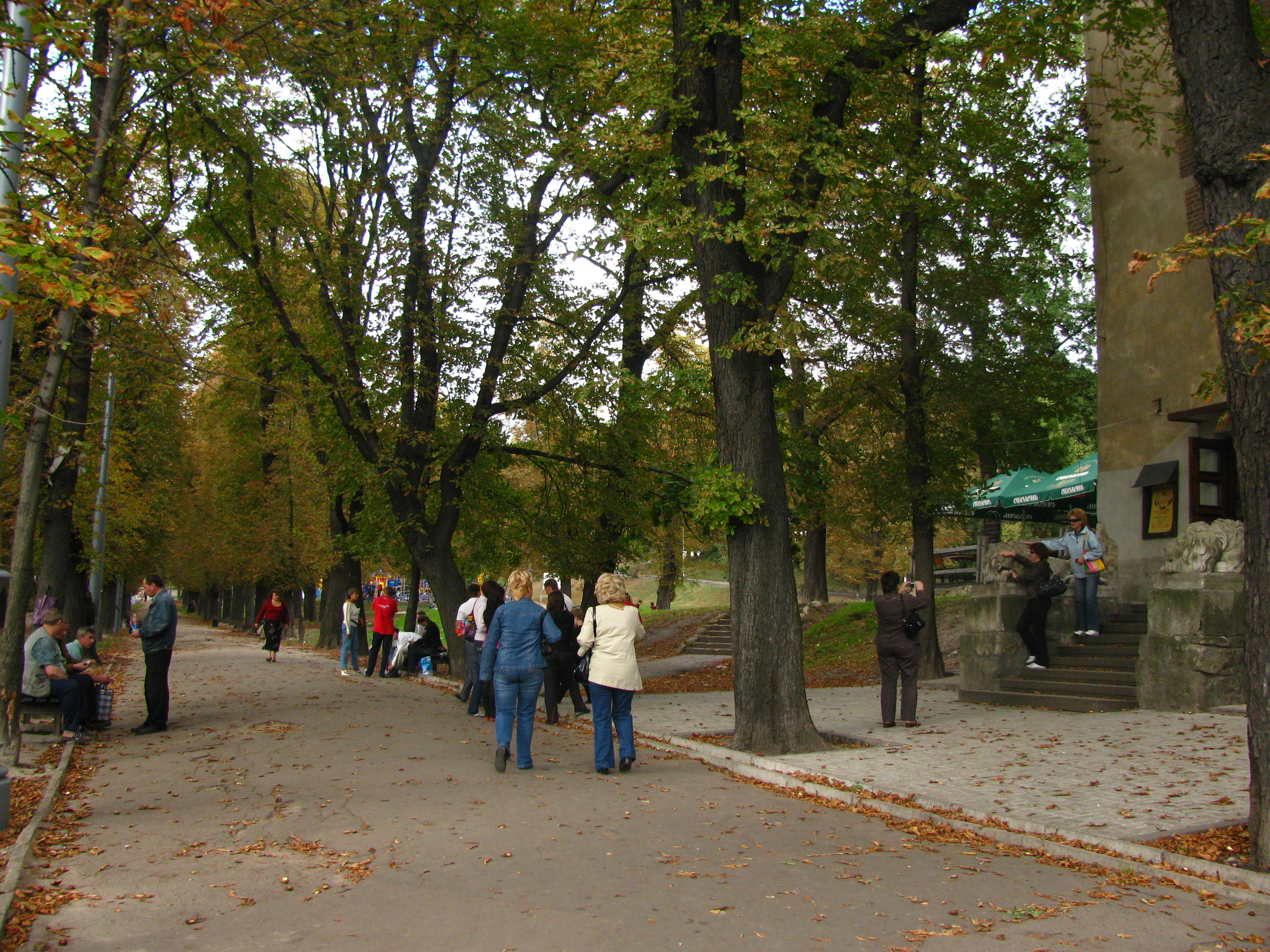 На Валах 1.jpg